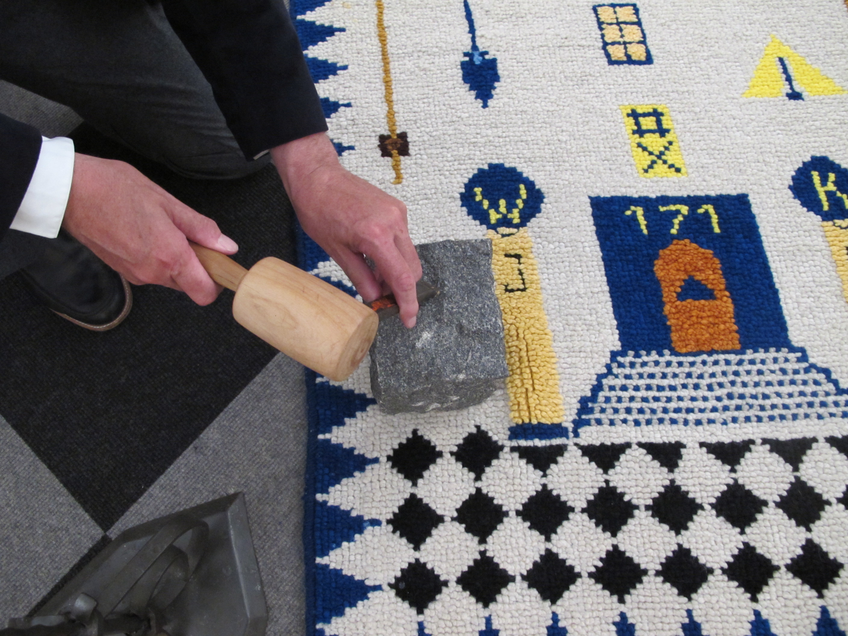 Met hamer en beitel schaaf je aan de steen die symbool staat voor je zelf in de Vrijmetselaarsloge de Achterhoek, Winterswijk